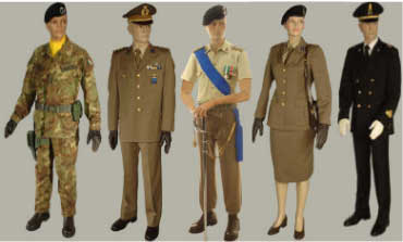 Uniformi esercito italiano collage